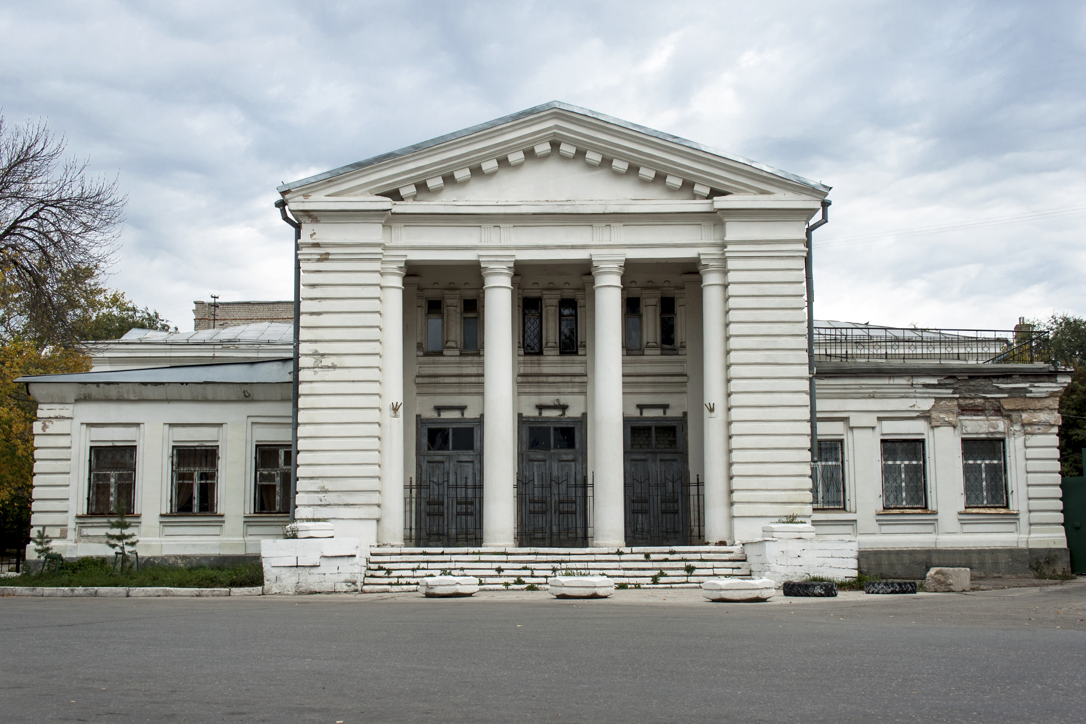 Хлебная Биржа (ул.Степана Разина 3а)